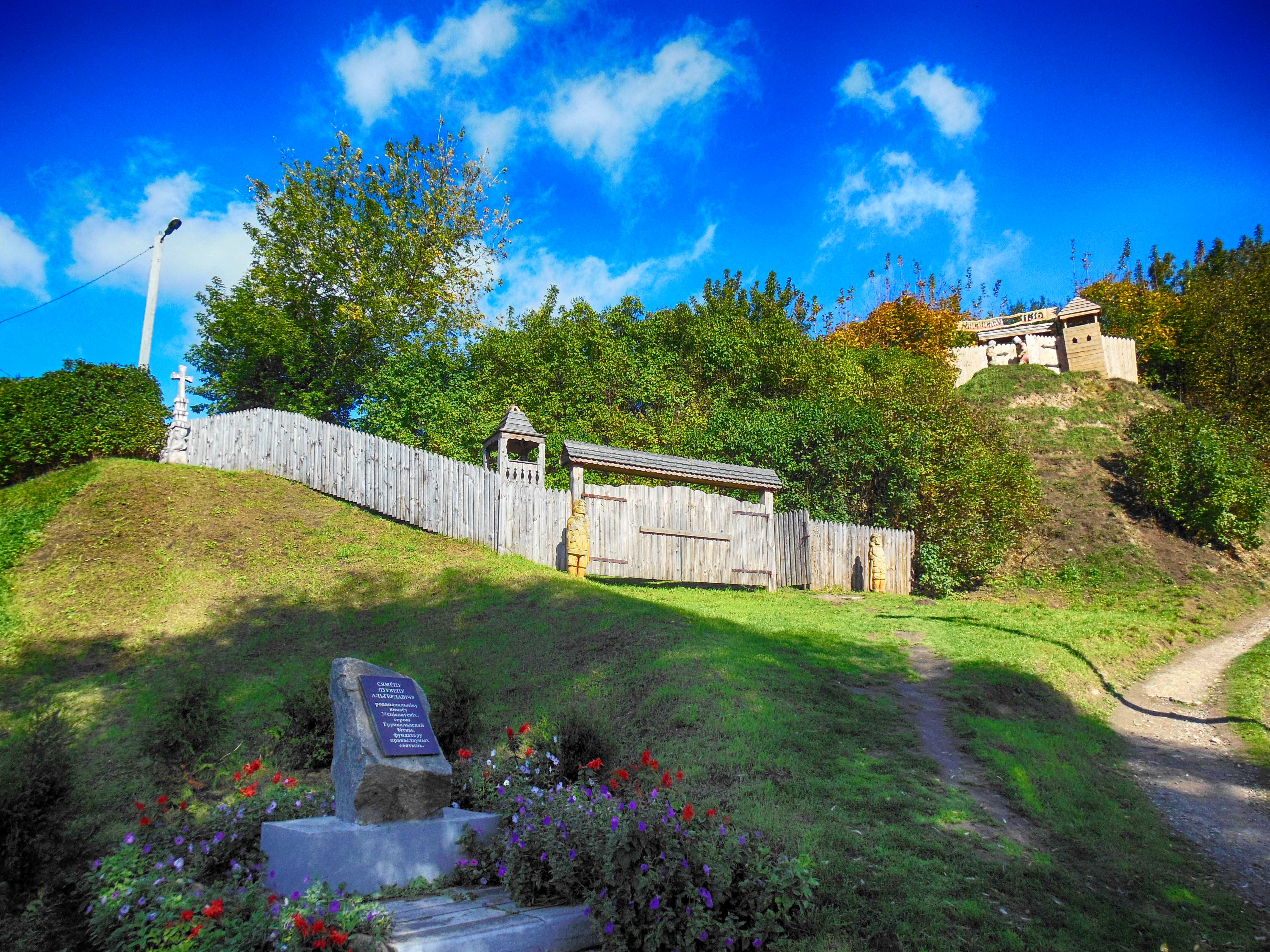 Беларуская (тарашкевіца): Мсьціслаў, Замкавая гара